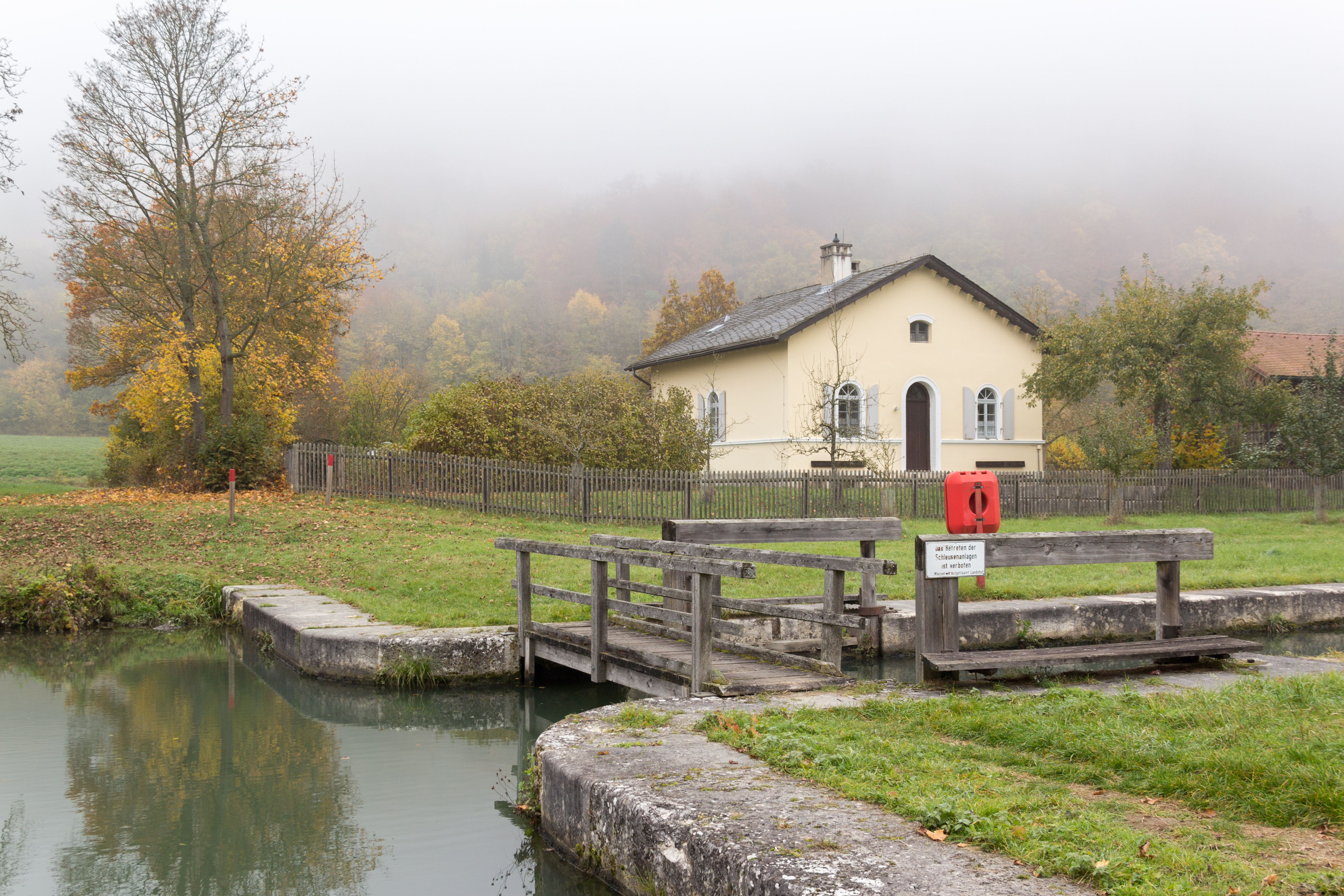 Ludwig-Donau-Main-Kanal, Schleuse 4, Schleuse, Essing, Altessing